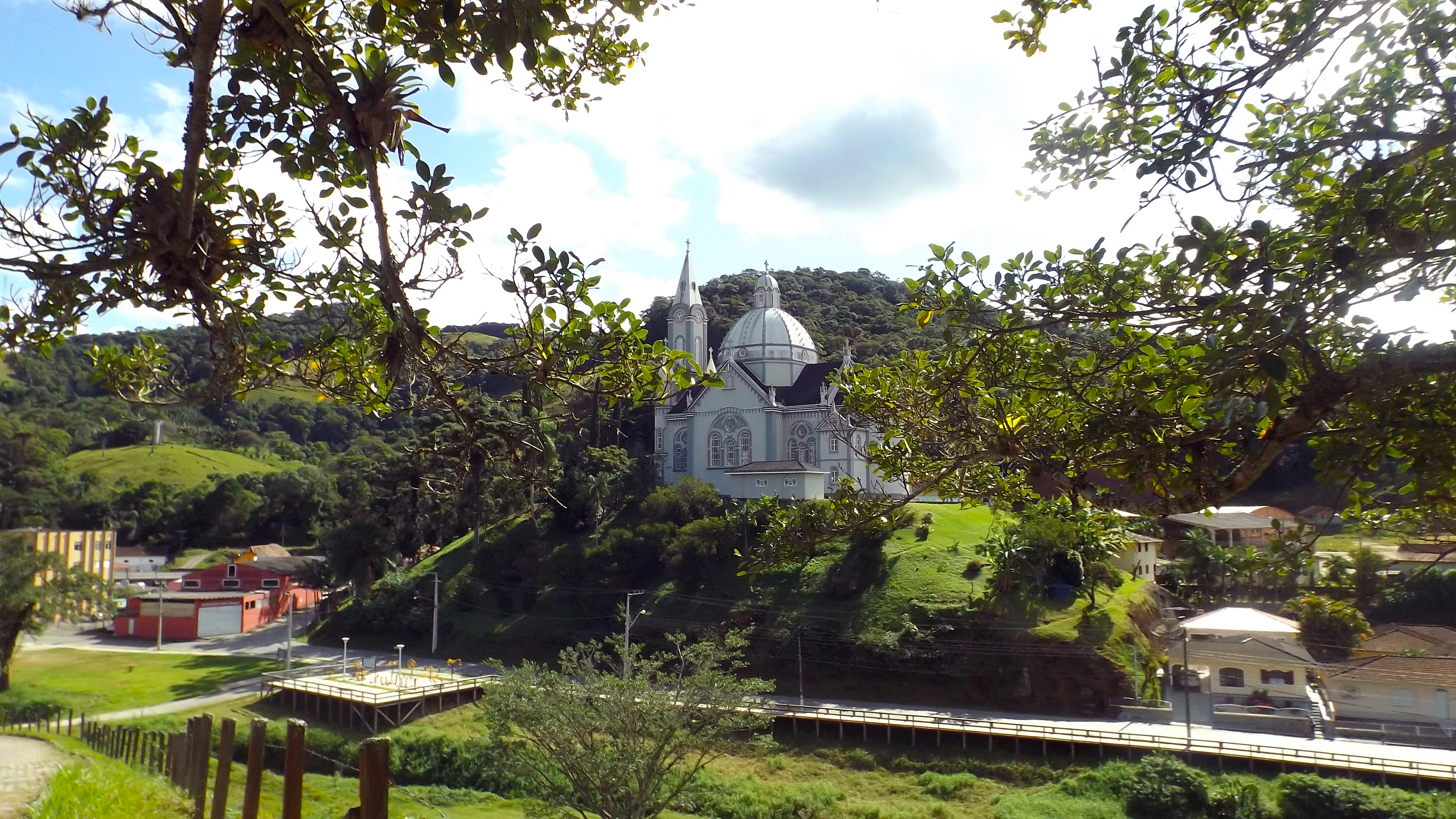 Vista da igreja via morro do cemitério